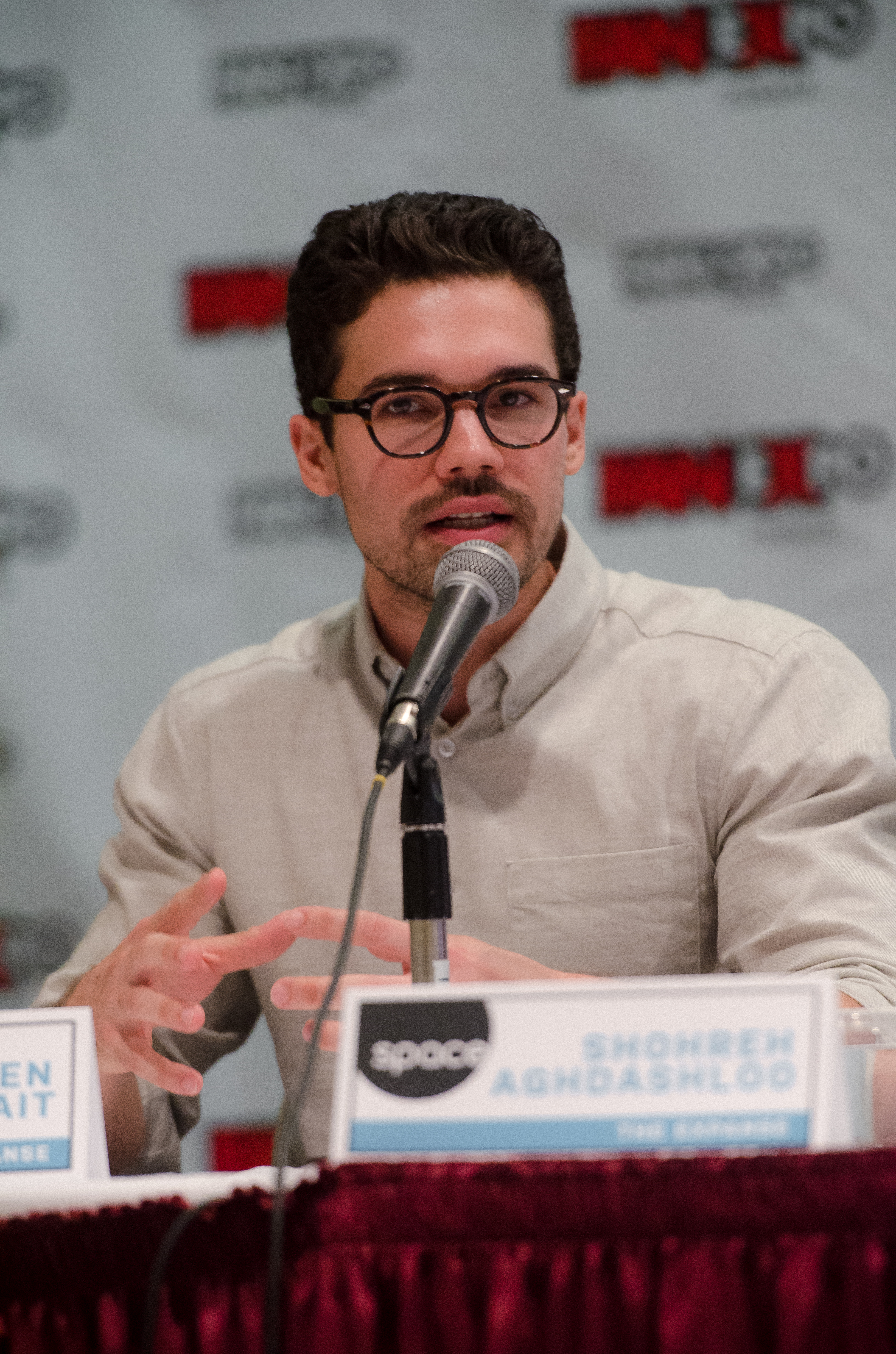 Steven Strait [2]